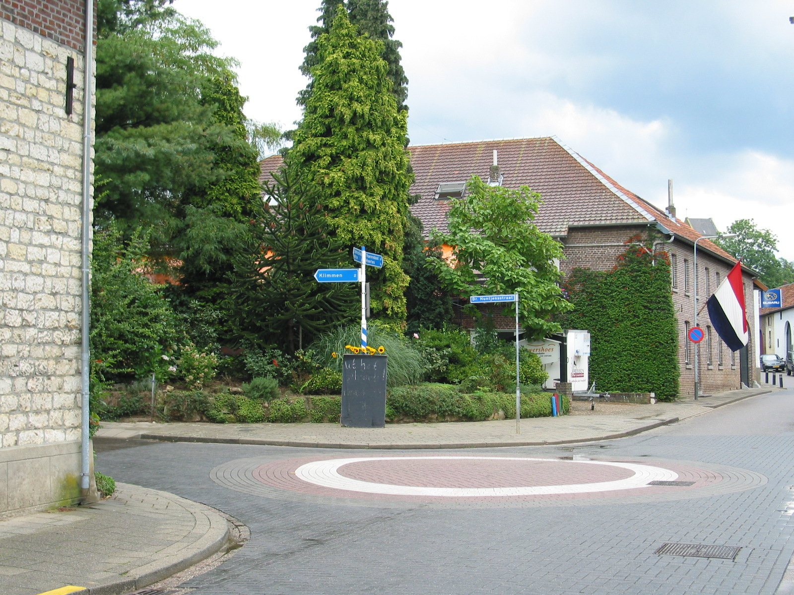 Rotonde in Ransdaal richting station Klimmen-Ransdaal